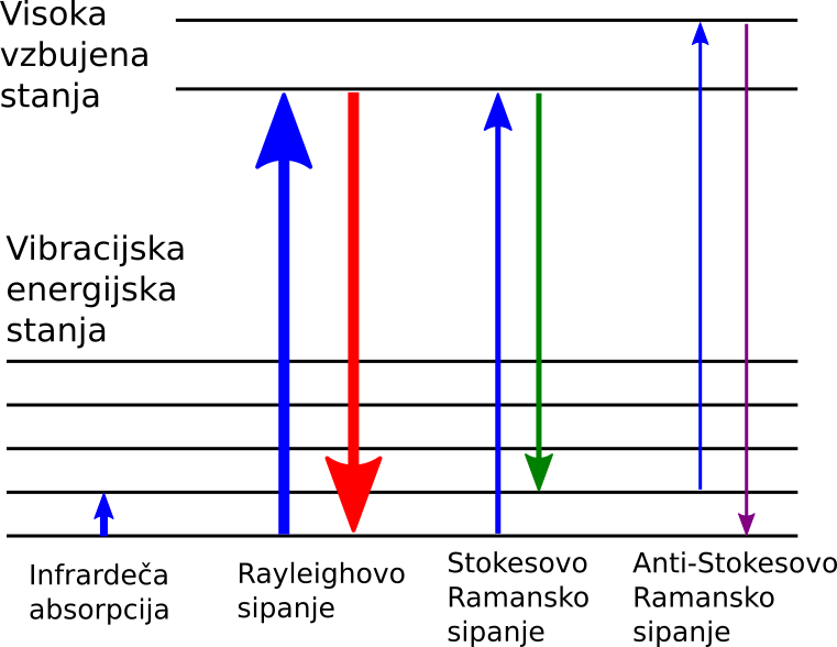 Rasterizian prevod